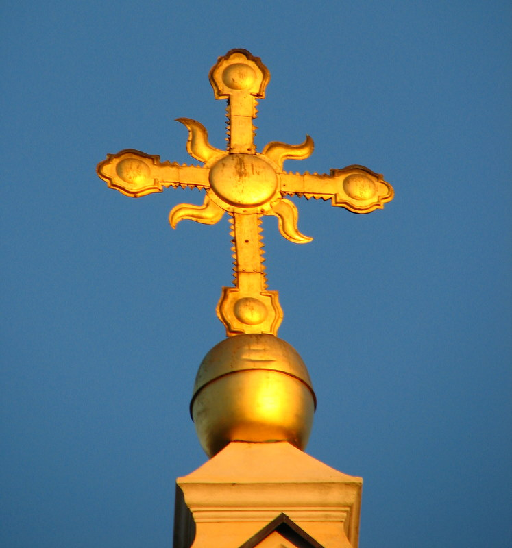 Krzyż na wieży kościoła św. Jerzego w Gnieźnie